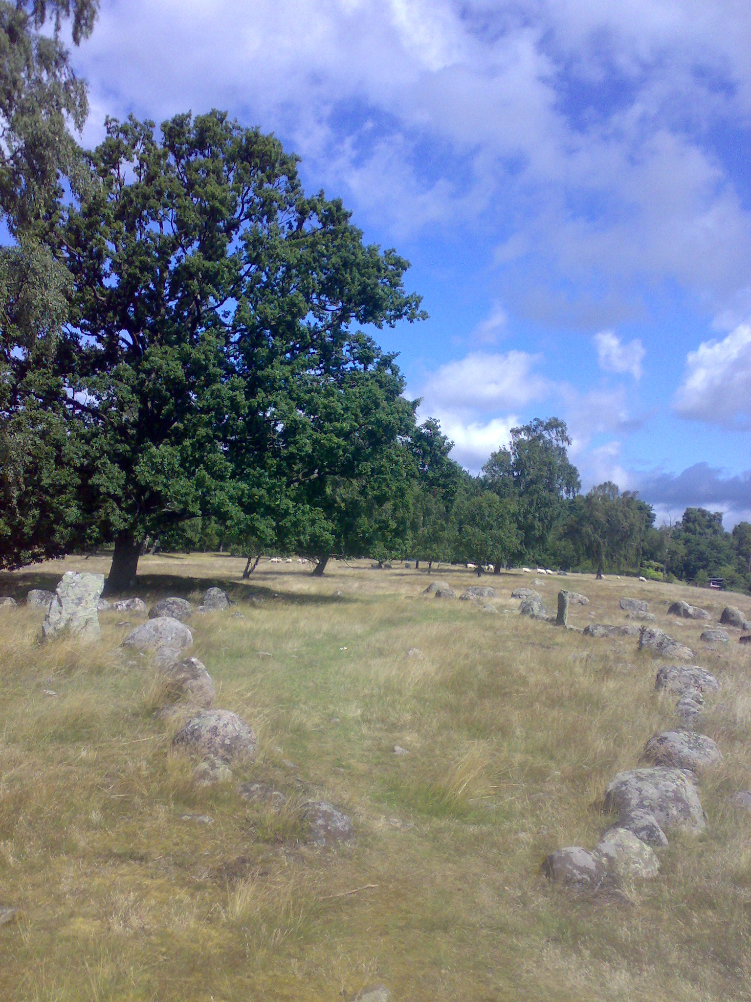 Hjortahammar, Blekinge, Sweden